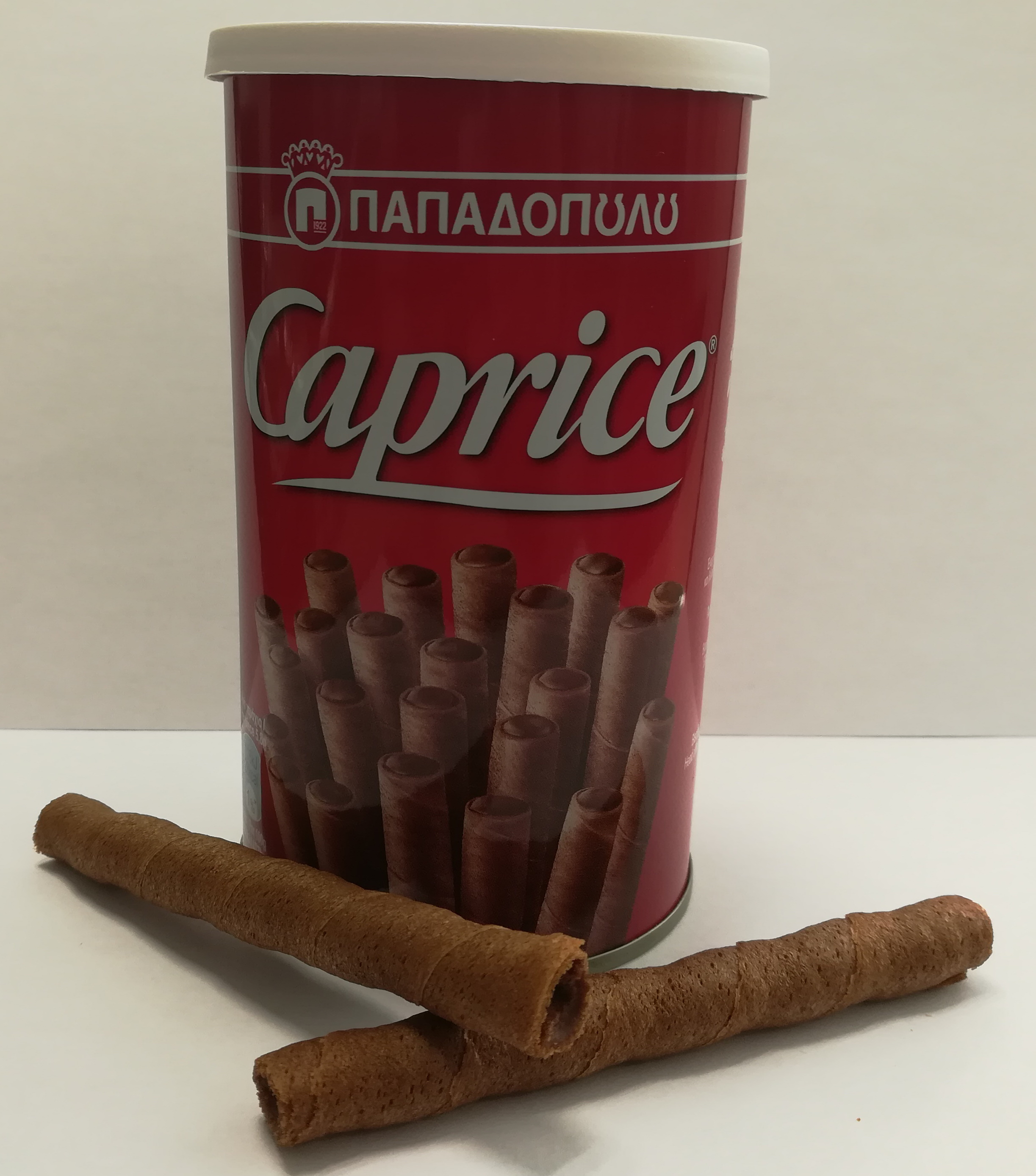 Photo d'une boite de biscuits "Caprice" de Papadopoulos